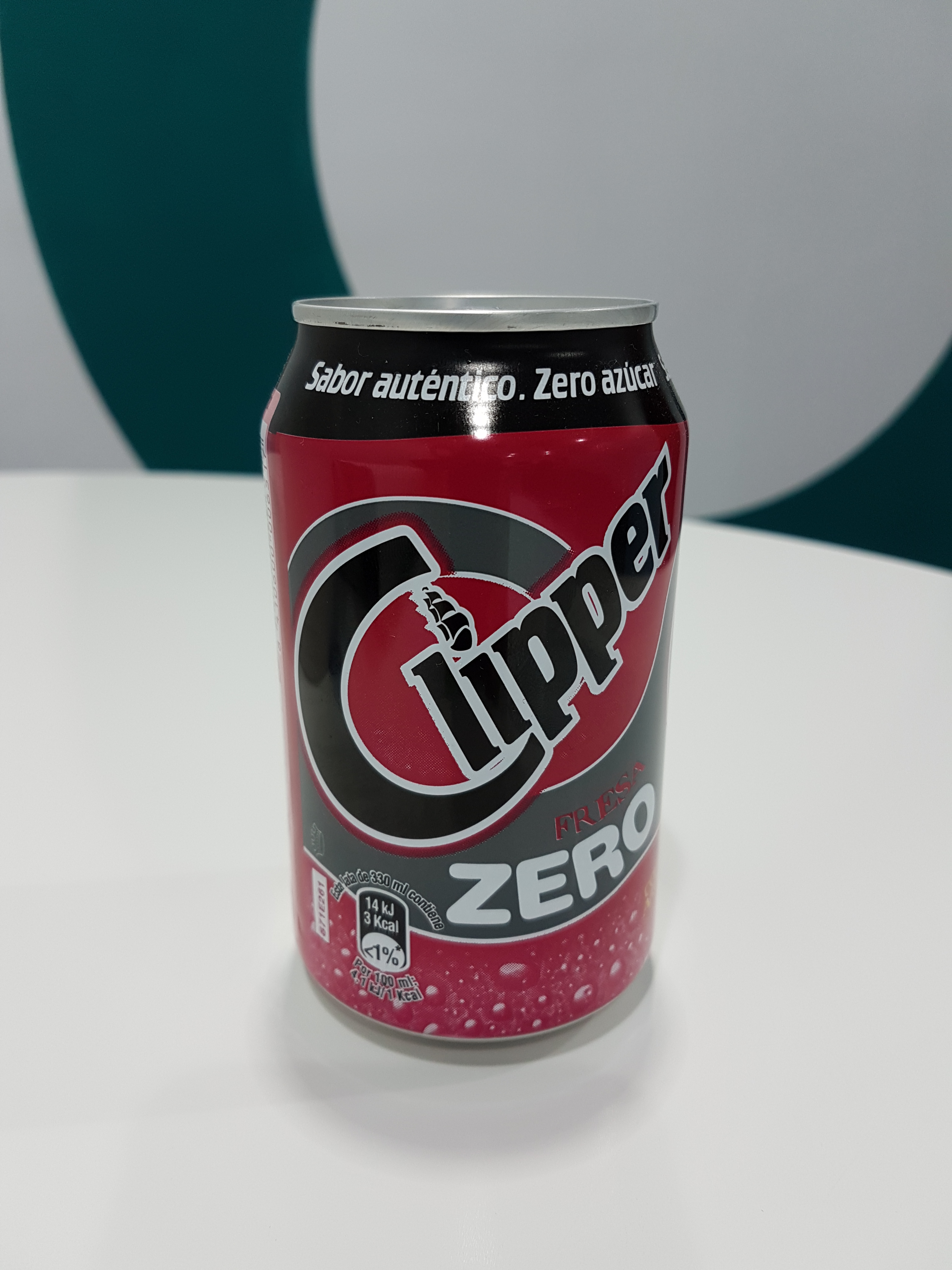 Lata de Clipper Zero 330